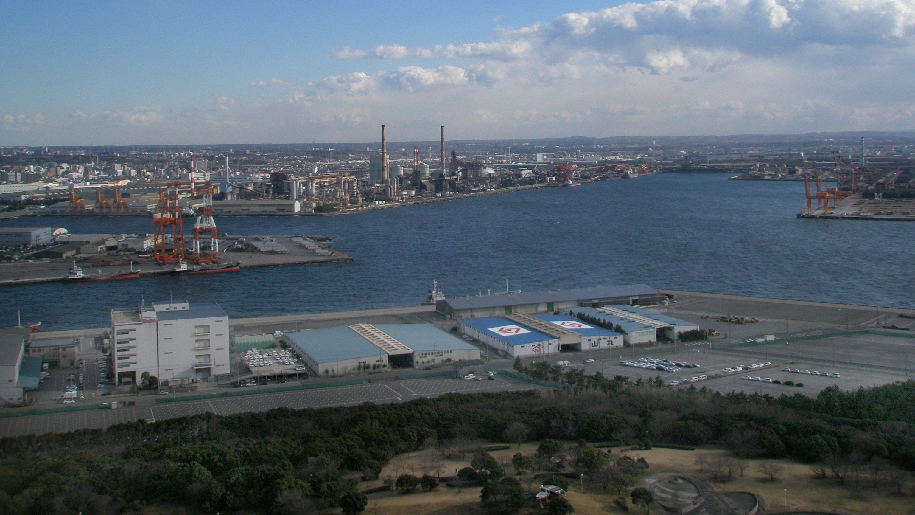 千葉ポートタワーから、市原市方向